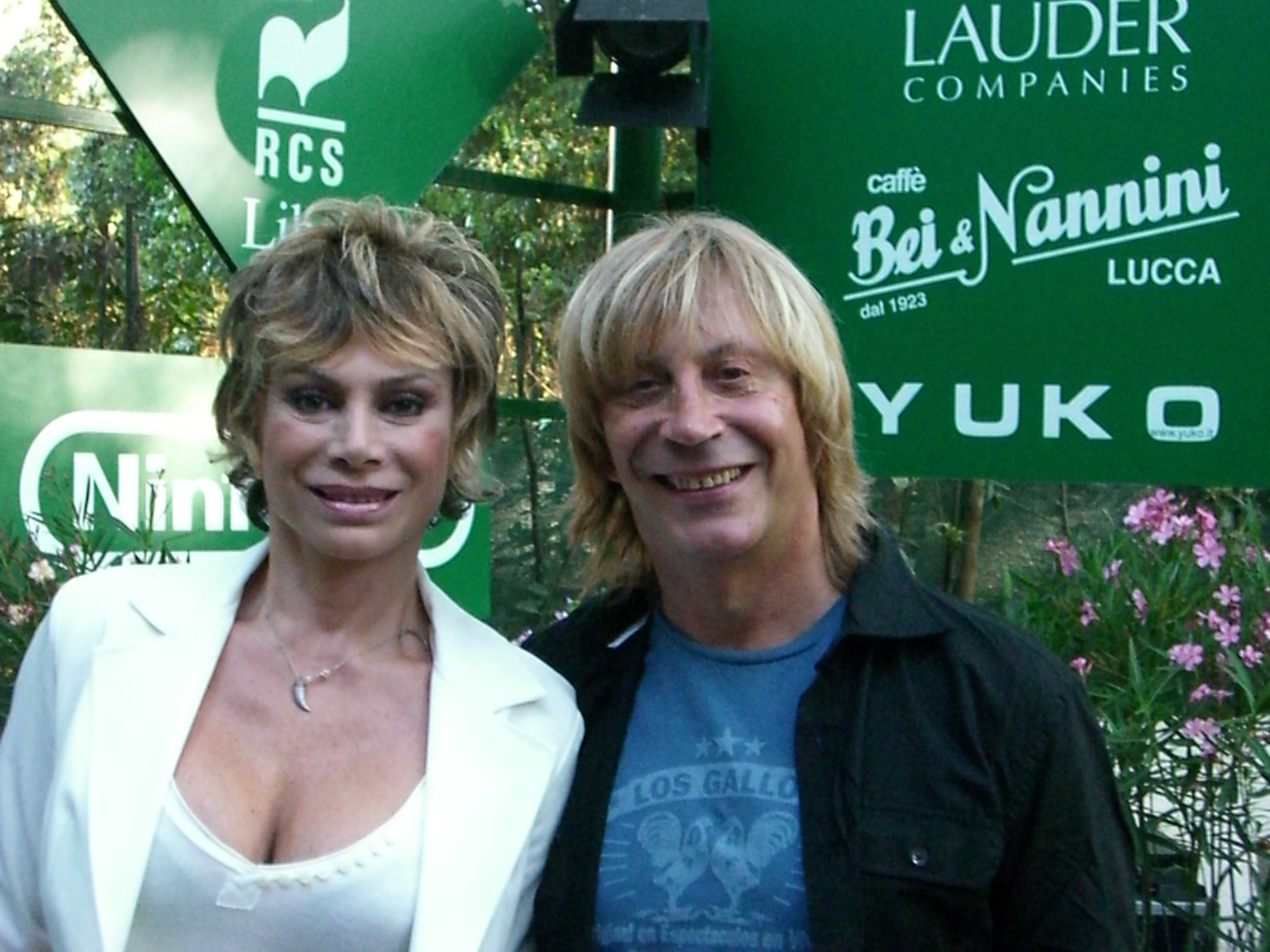 La show girl Carmen Russo in compagnia del marito e coreografo Enzo Paolo Turchi